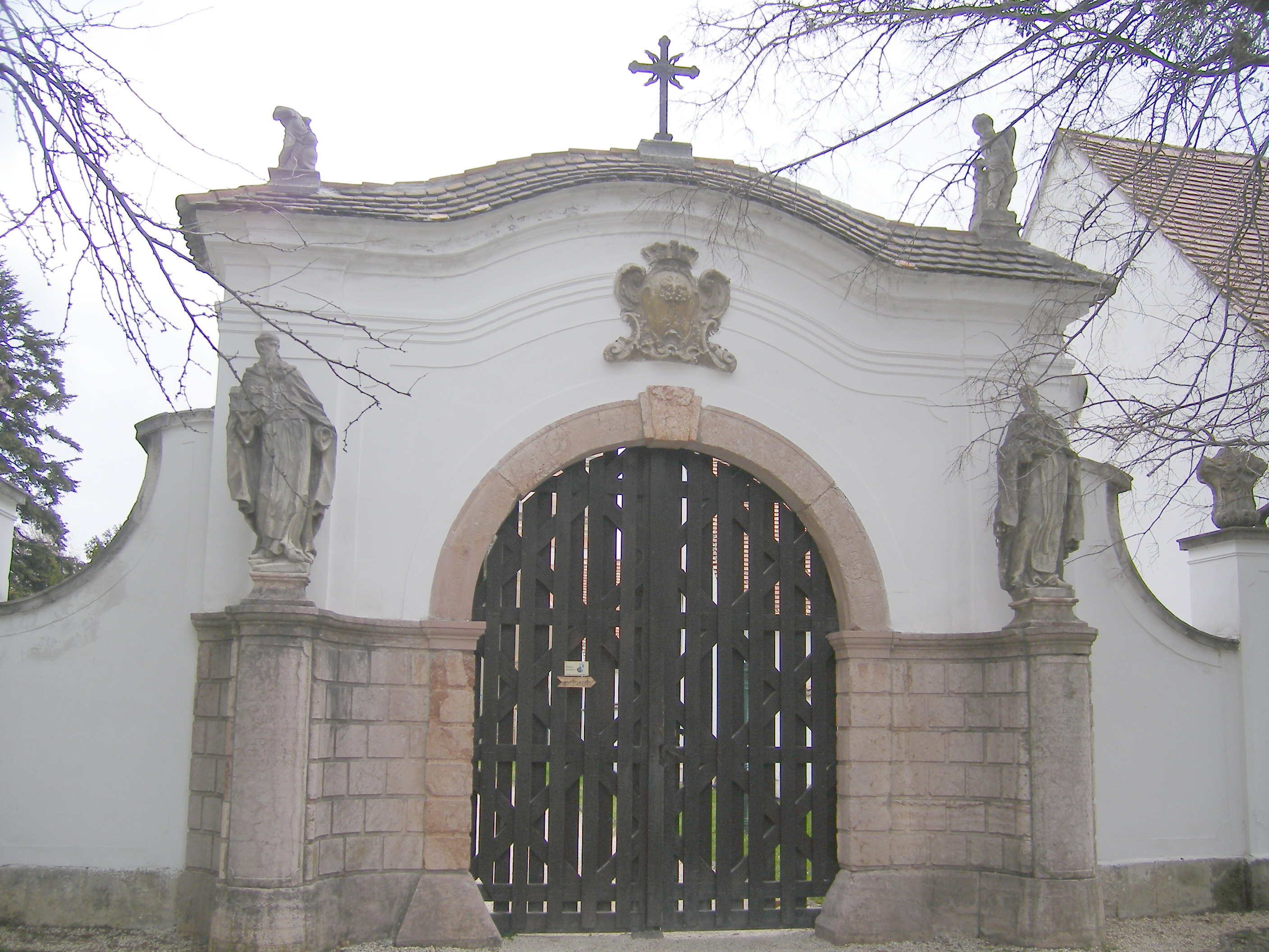 Oroszlány - majkpusztai kamalduli apátság